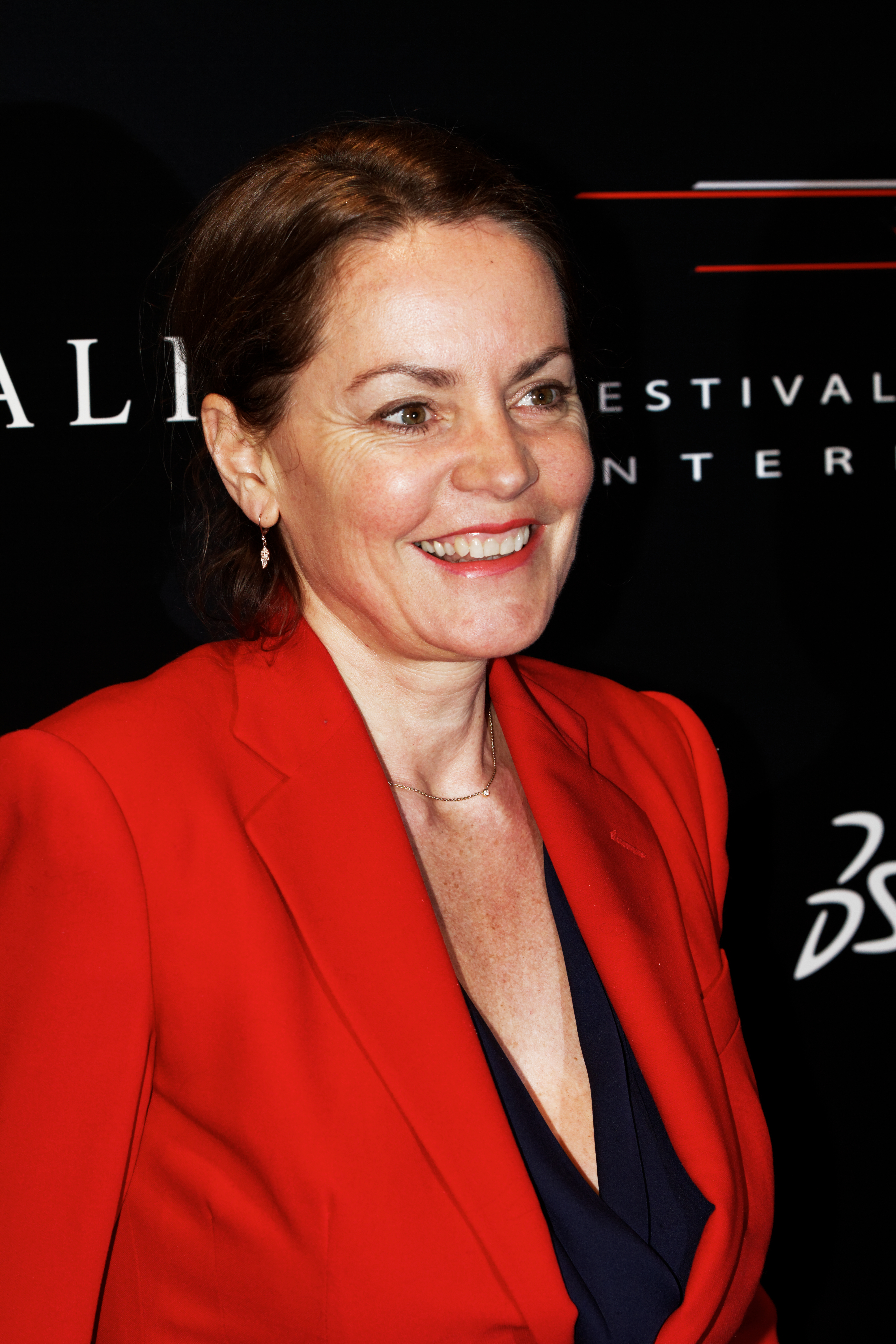 Cendrine Dominguez posant lors du photocall du festival automobile 2014.